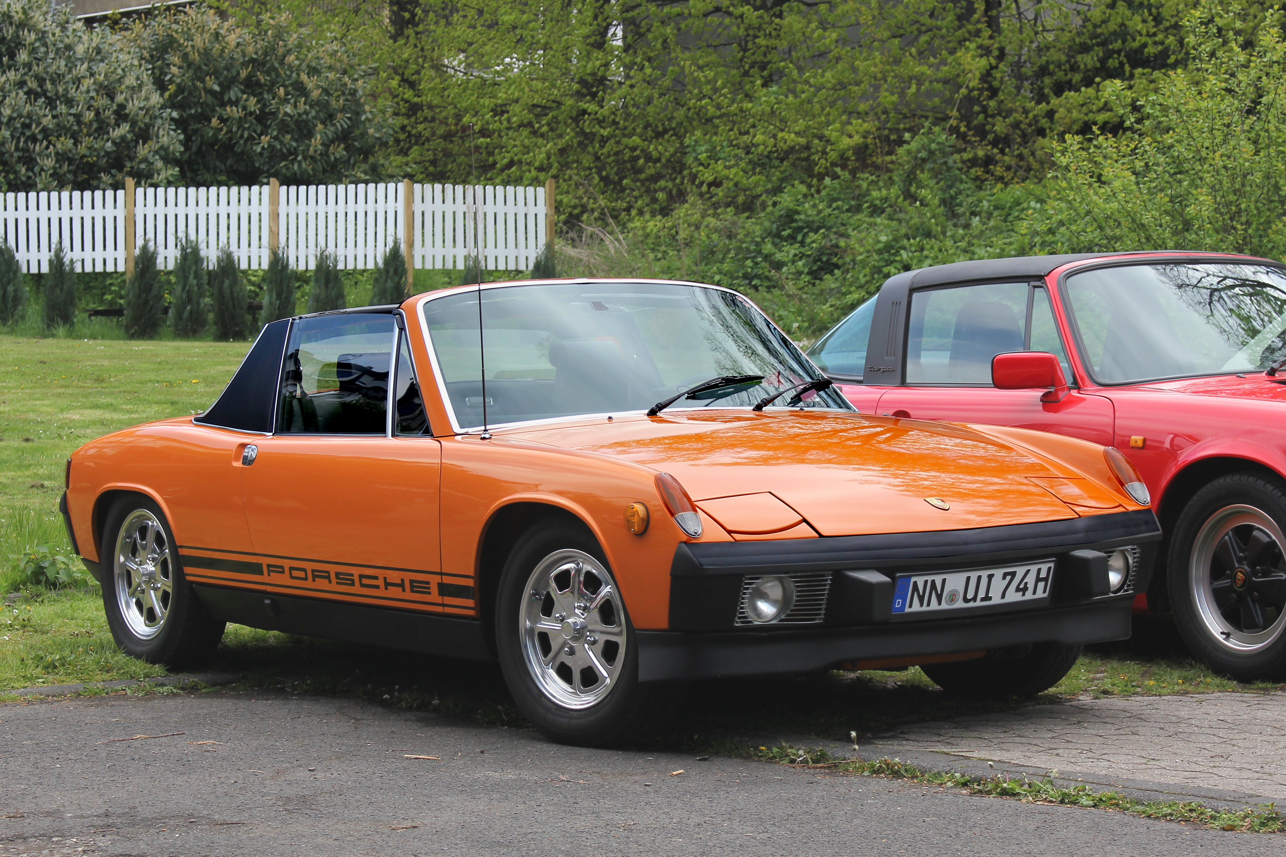 Porsche 914 mit 4-Zylinder-Motor, US-Ausführung, wahrscheinlich Baujahr 1974 (fiktives Kennzeichen)